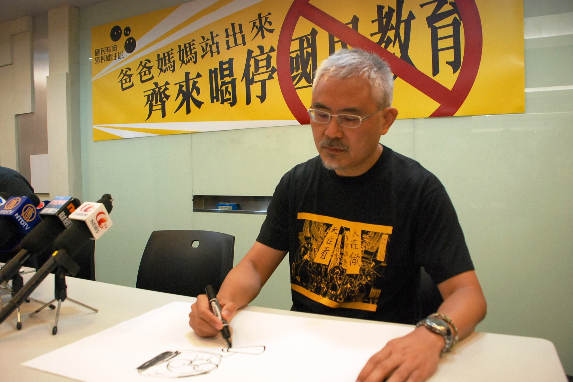 香港政治漫畫家尊子出席國民教育家長關注組記者會，即席繪畫一幅諷刺國民教育科的政治漫畫。